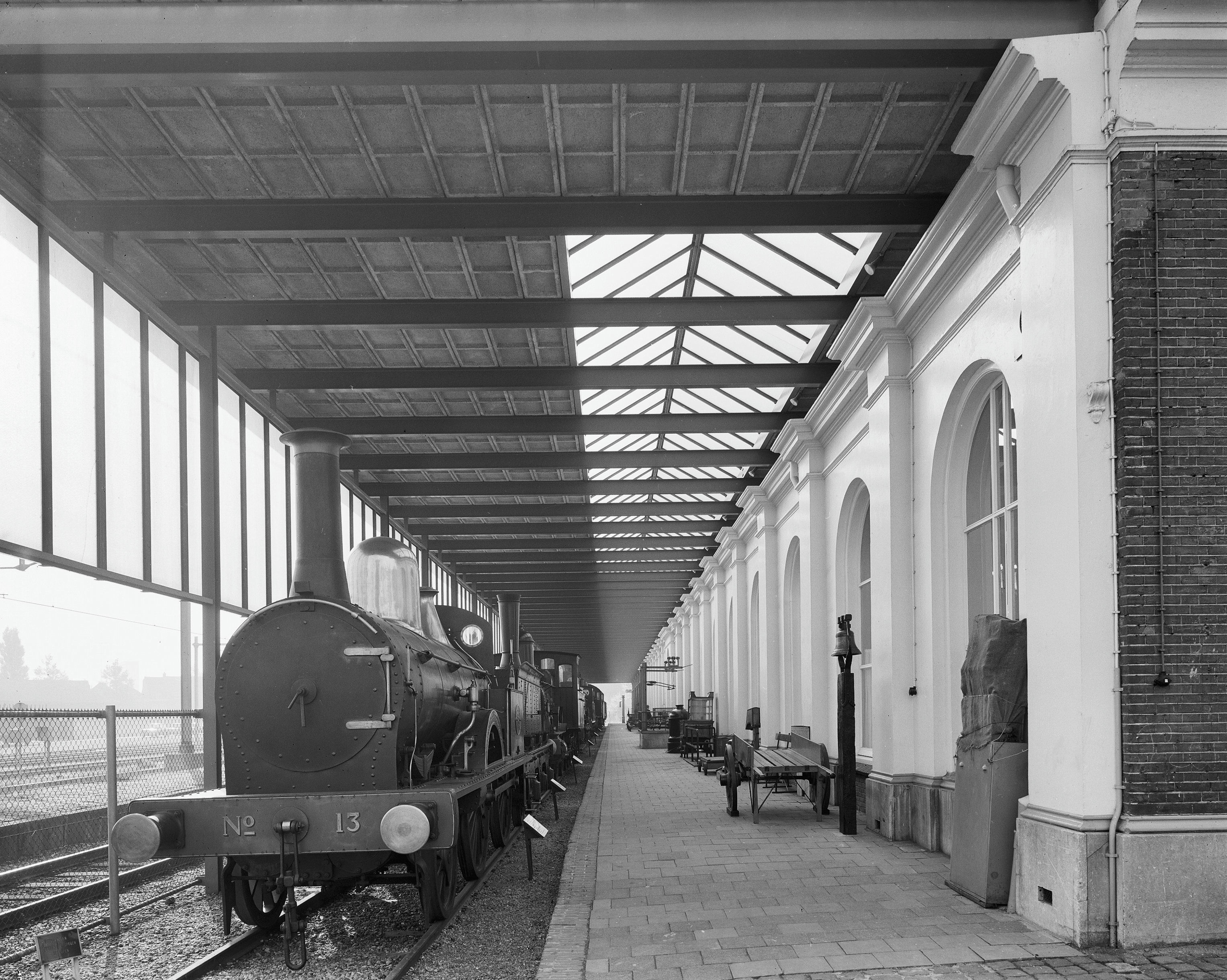 Station Maliebaan: overzicht perron